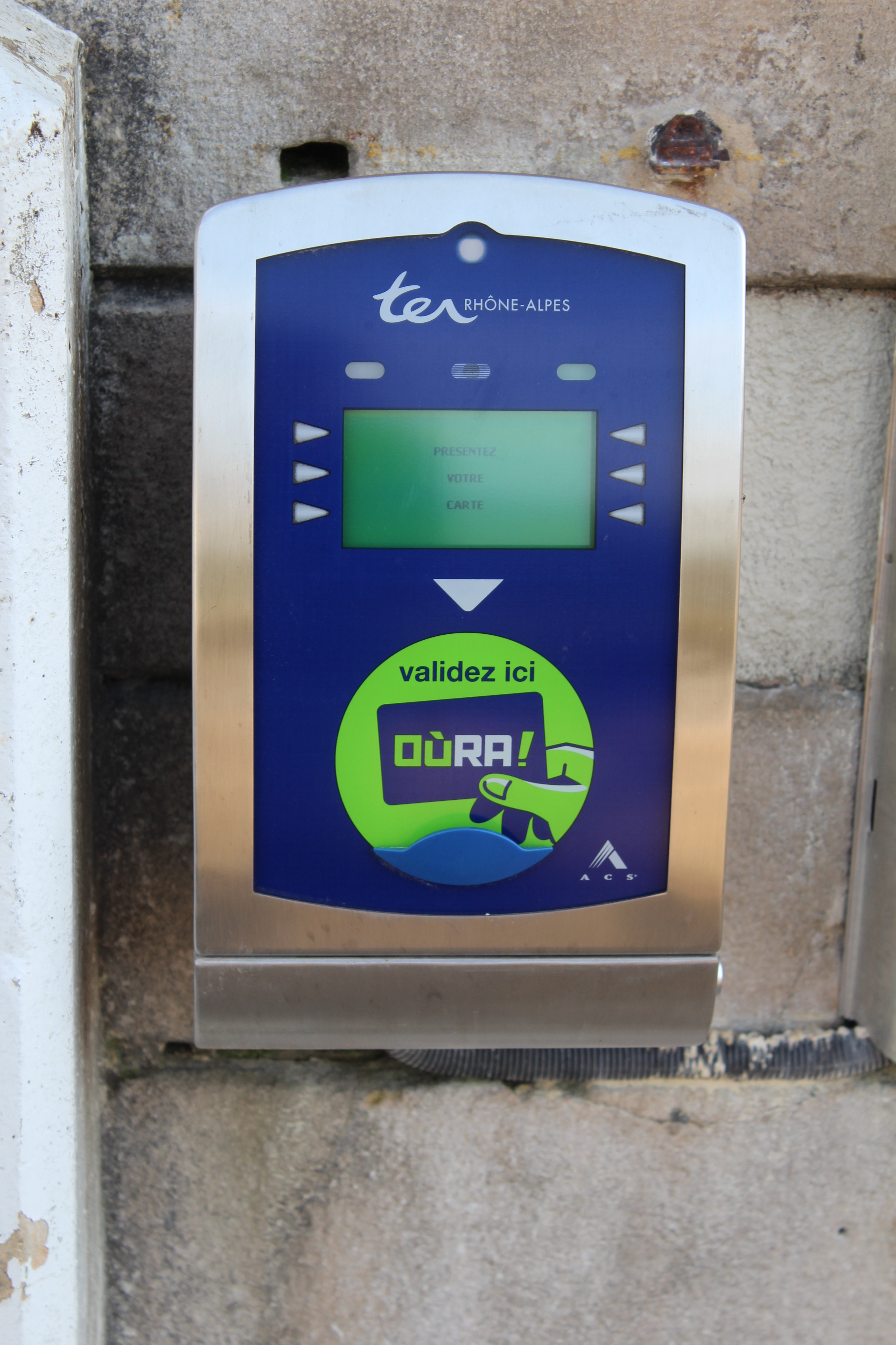 Gare de Pont-de-Veyle à Crottet.